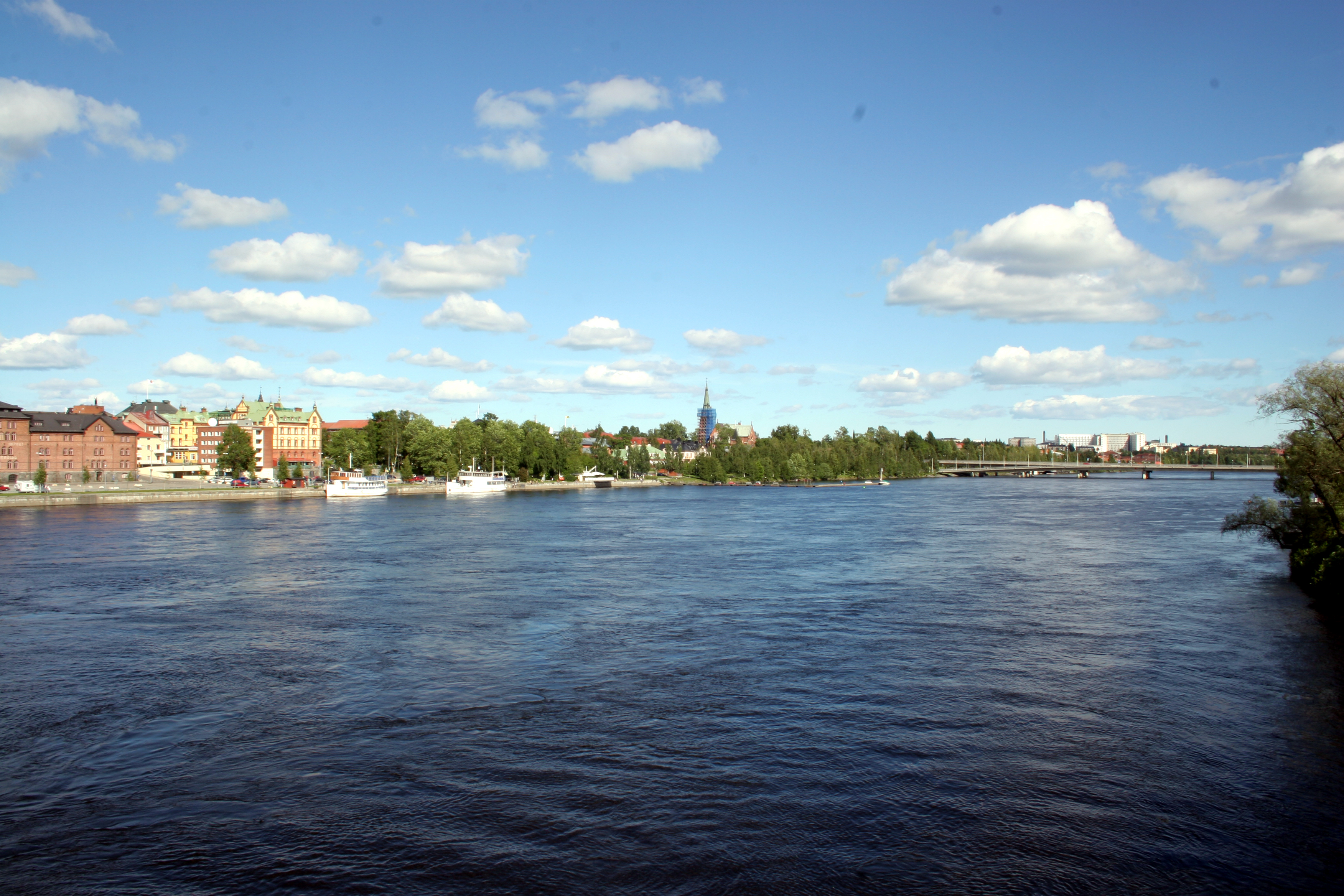 Ume älv viewed from Tegsbron (E4) in Umeå, Sweden